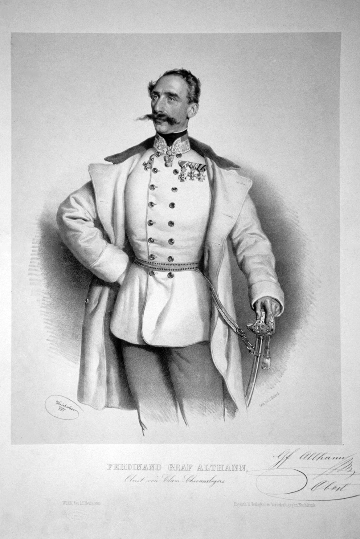 Michael Ferdinand von Althann, Lithographie von Josef Kriehuber, 1851